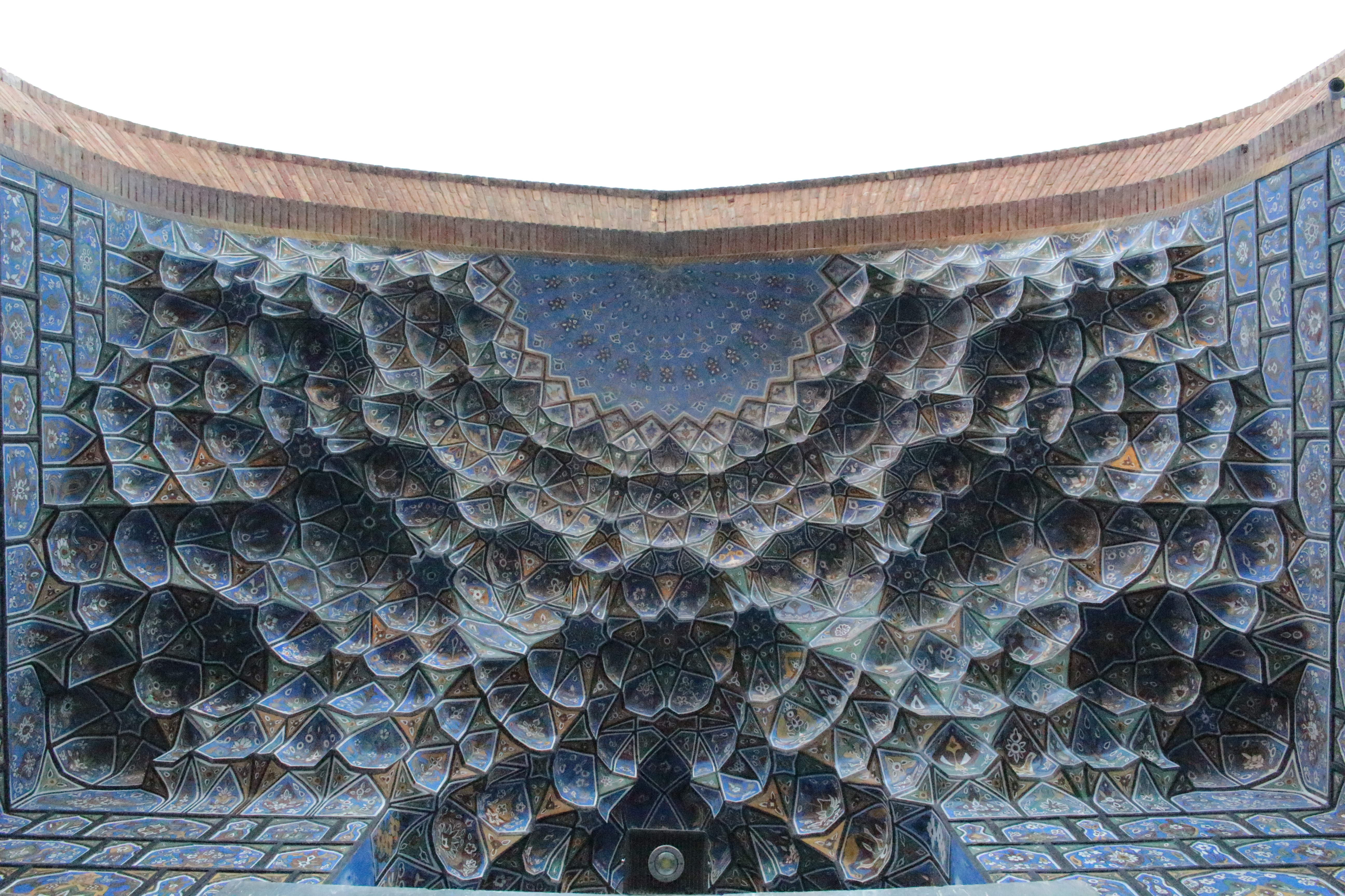 مدرسه عباسقلیخان